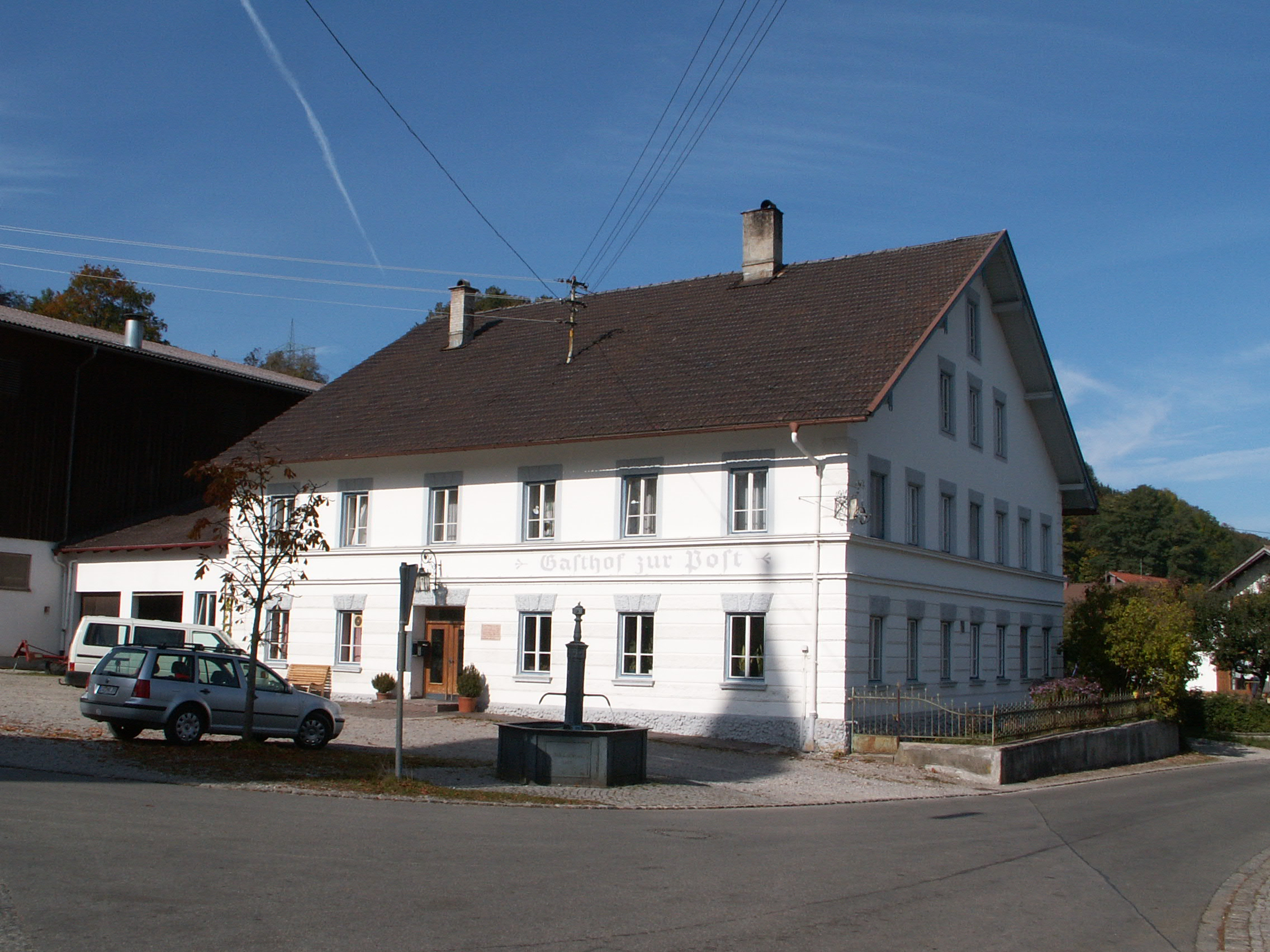 Gasthof zur Post in Osterzell